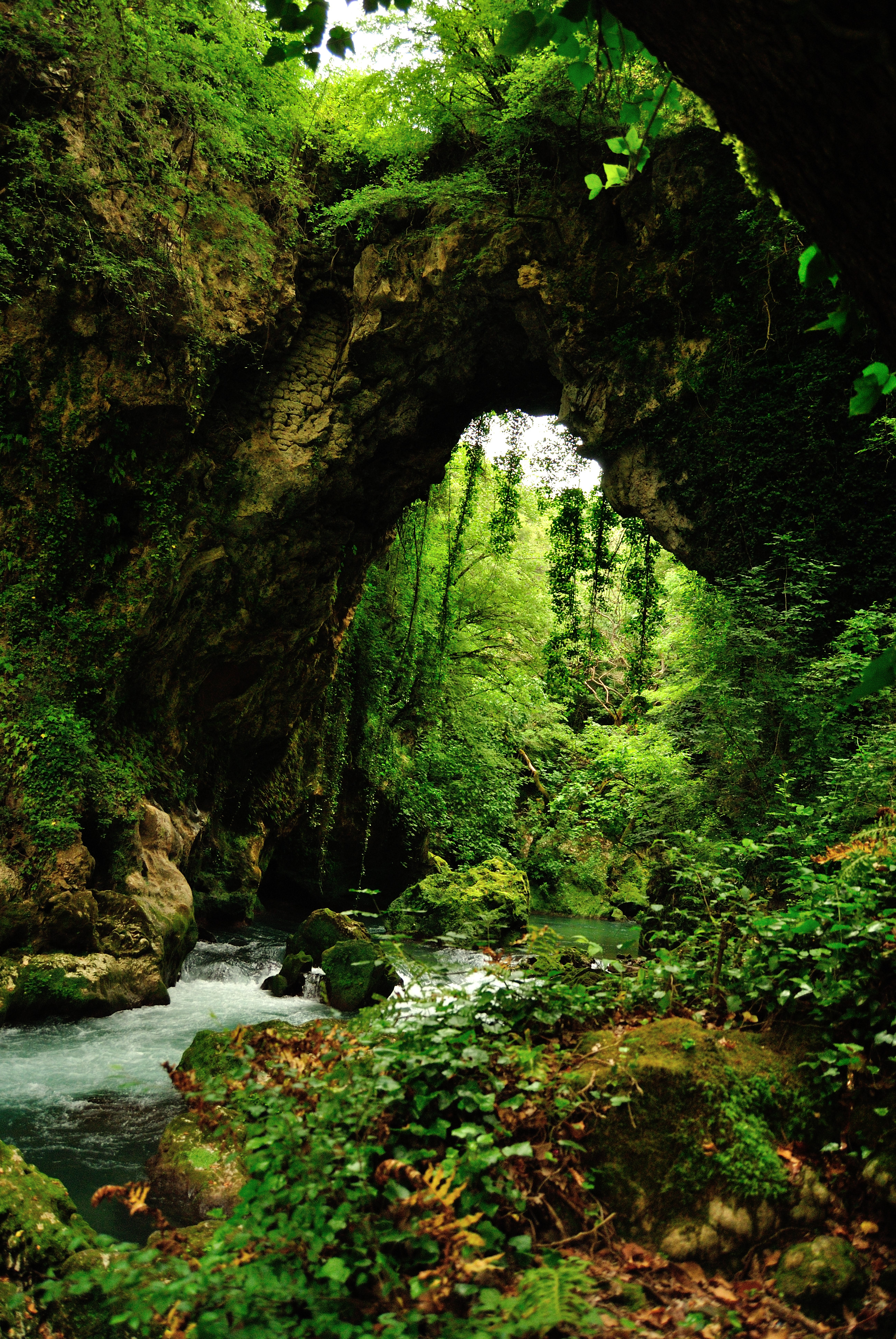 Θεογέφυρο«Θεογέφυρο»